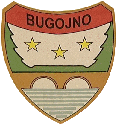 Wappen der Stadt Bugojno